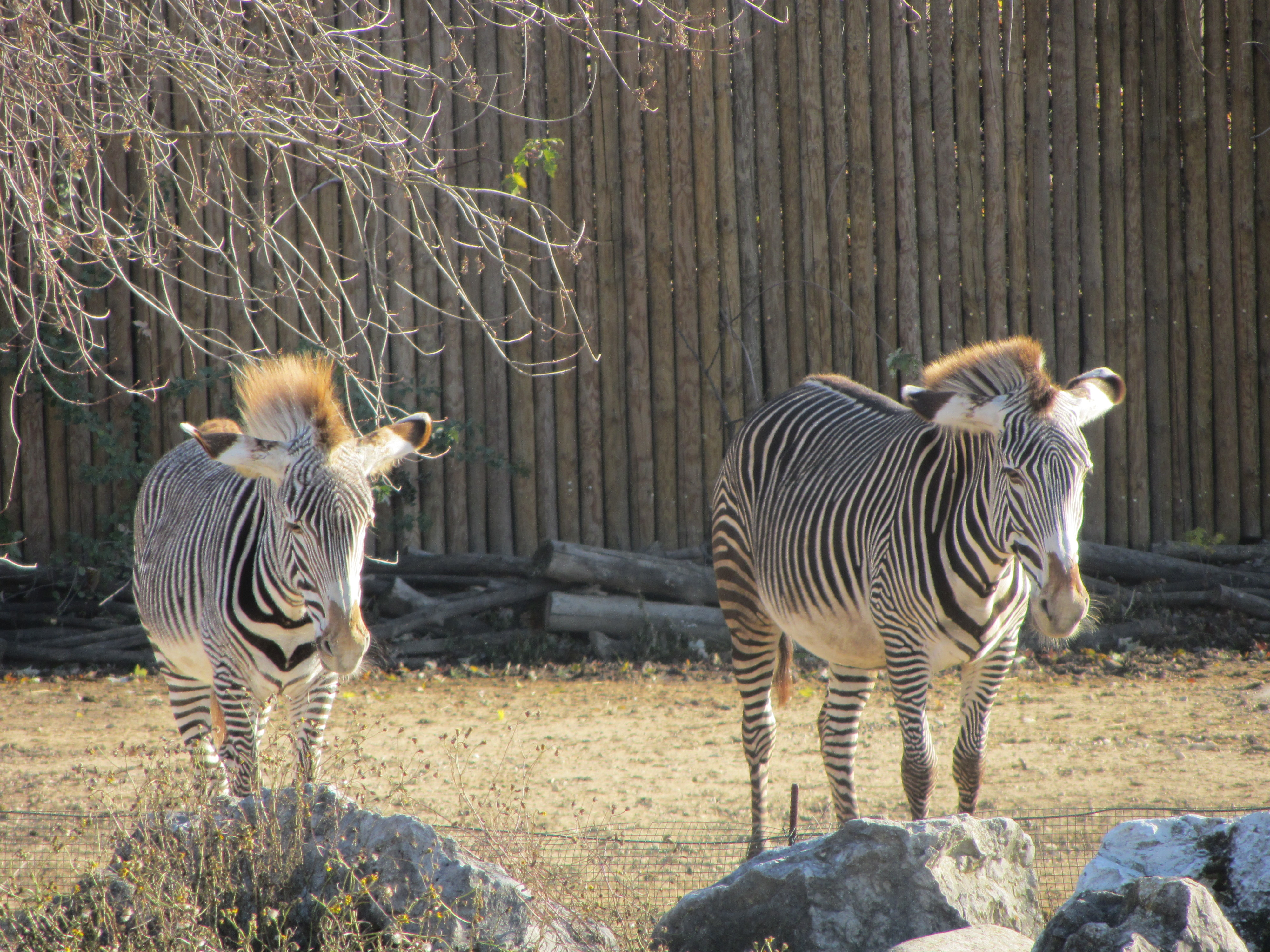 due esemplari di zebra di Grévy ( o zebra imperiale) al Parco Natura Viva di Verona - ITALIA